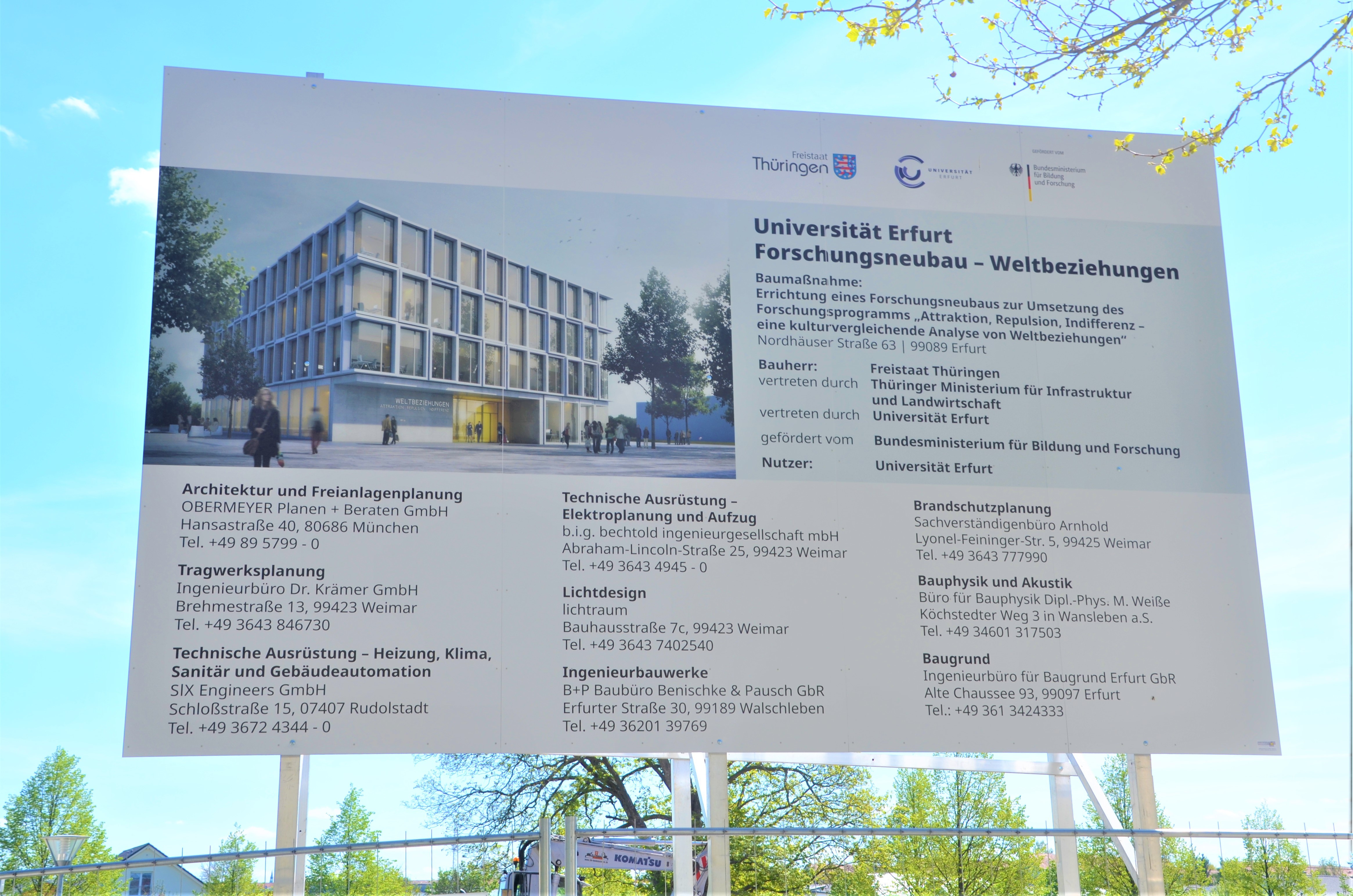 Bauschild für den Neubau des Max-Weber-Kollegs auf dem Campus der Uni Erfurt